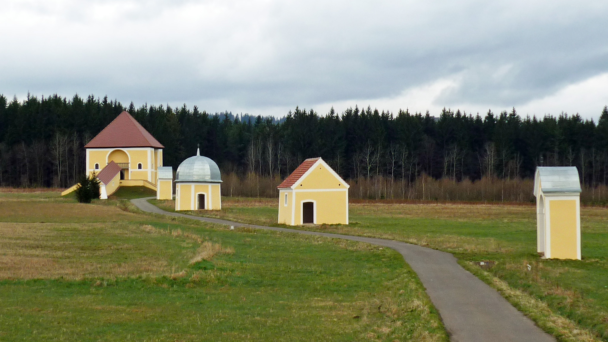 Kalwarienberg in Krzeszów (Grüssau) in Niederschlesien